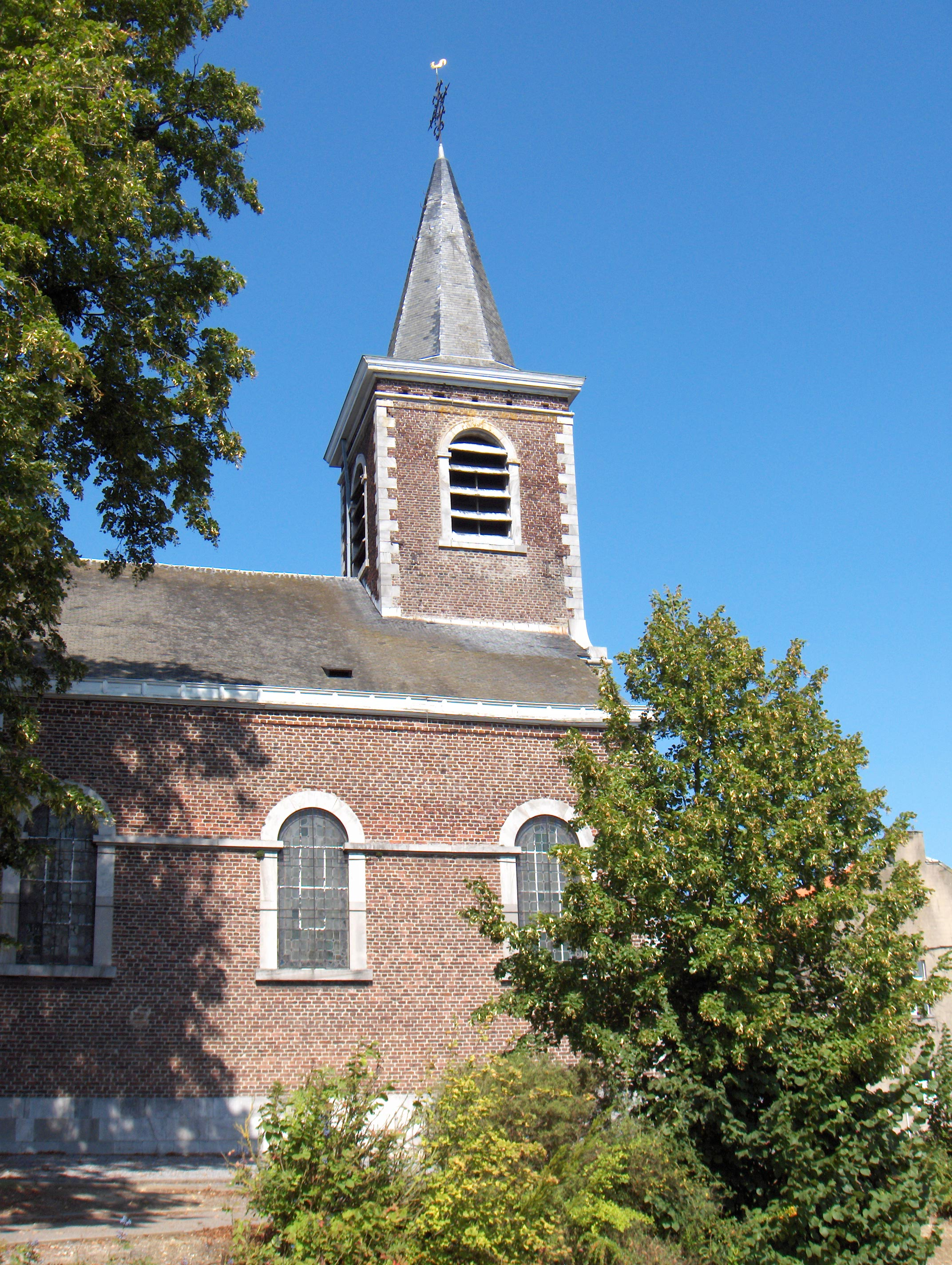 Marneffe (Ortsteil der Gemeinde Burdinnen, Prov. Lüttich, Belgien), Dorfkirche aus 1851 (église de l'Immaculée Conception)